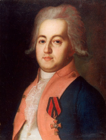 Неизвестный художник. Портрет И.И.Панаева / Коллекция Подстаницких Иван Иванович Панаев (1753-1796) – дворянин, находился на военной службе (с 1775 адъютант П.Румянцева, в 1777-1780 – адъютант Я.Брюса, участник польской кампании). Писатель и перводчик, близкий друг Н.Новикова и Н.Карамзина. С 1781 – на гражданской службе в Перми и Казани. На время создания портрета – прокурор и директор народных училищ Пермской губернии (изображен в дворянском мундире Пермской губернии). Известно несколько копий, восходящих, по всей видимости, к данному оригиналу: живописные (Мемориальный музей-квартира Н.Некрасова, Петербург и частное собрание, Москва) и миниатюрная (И.Батлер, 1803 г., Государственный Русский музей). Происхождение: аукцион Polgar (Будапешт) 8-10 декабря 2003 г. (лот № 60, как «Портрет неизвестного»).